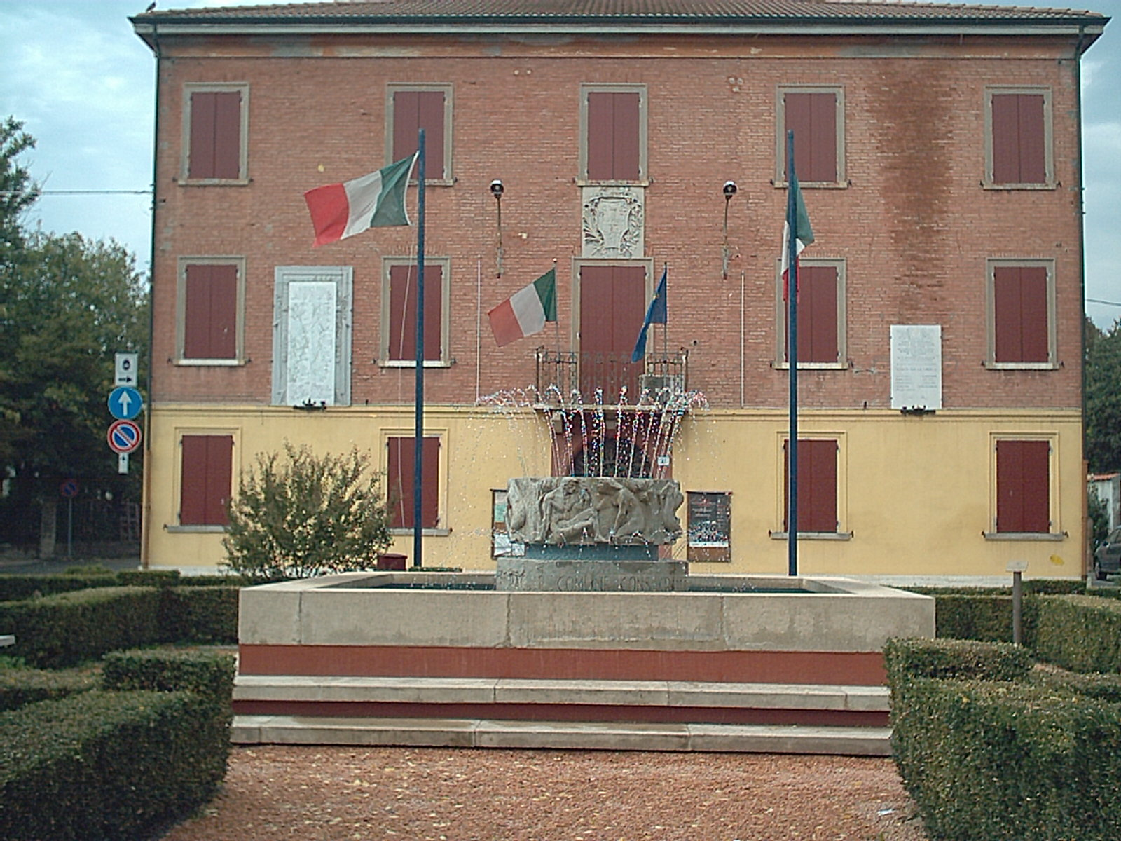 Municipio di Medolla